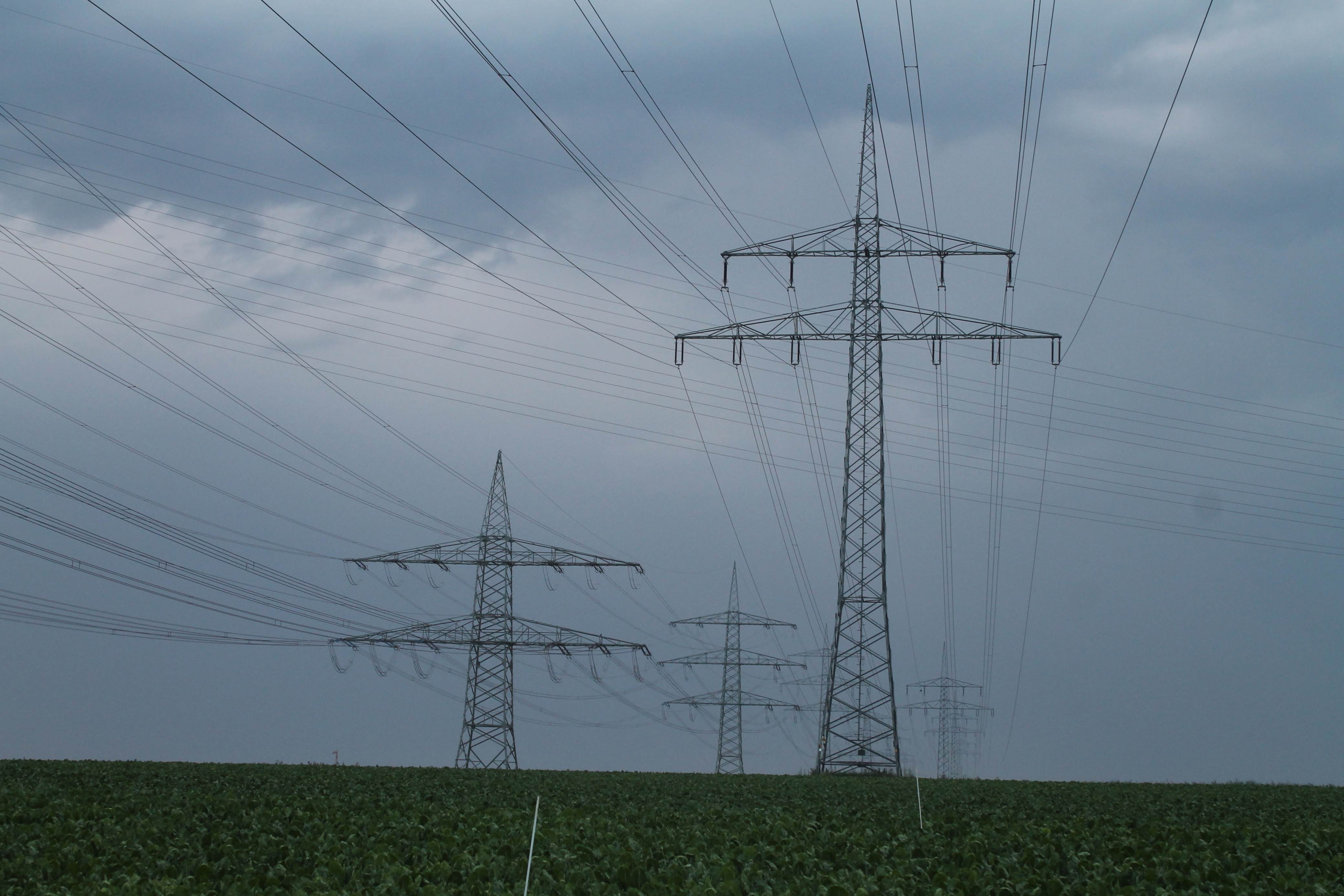 Hochspannungsleitungen zum Umspannwerk Neckarwestheim südöstlich von Leingarten; vorne Hybridmast: oben Bahnstrom (Neckarwestheim–Neckarelz), unten 110 kV (Bl. 1007 Großgartach–Ilsfeld)